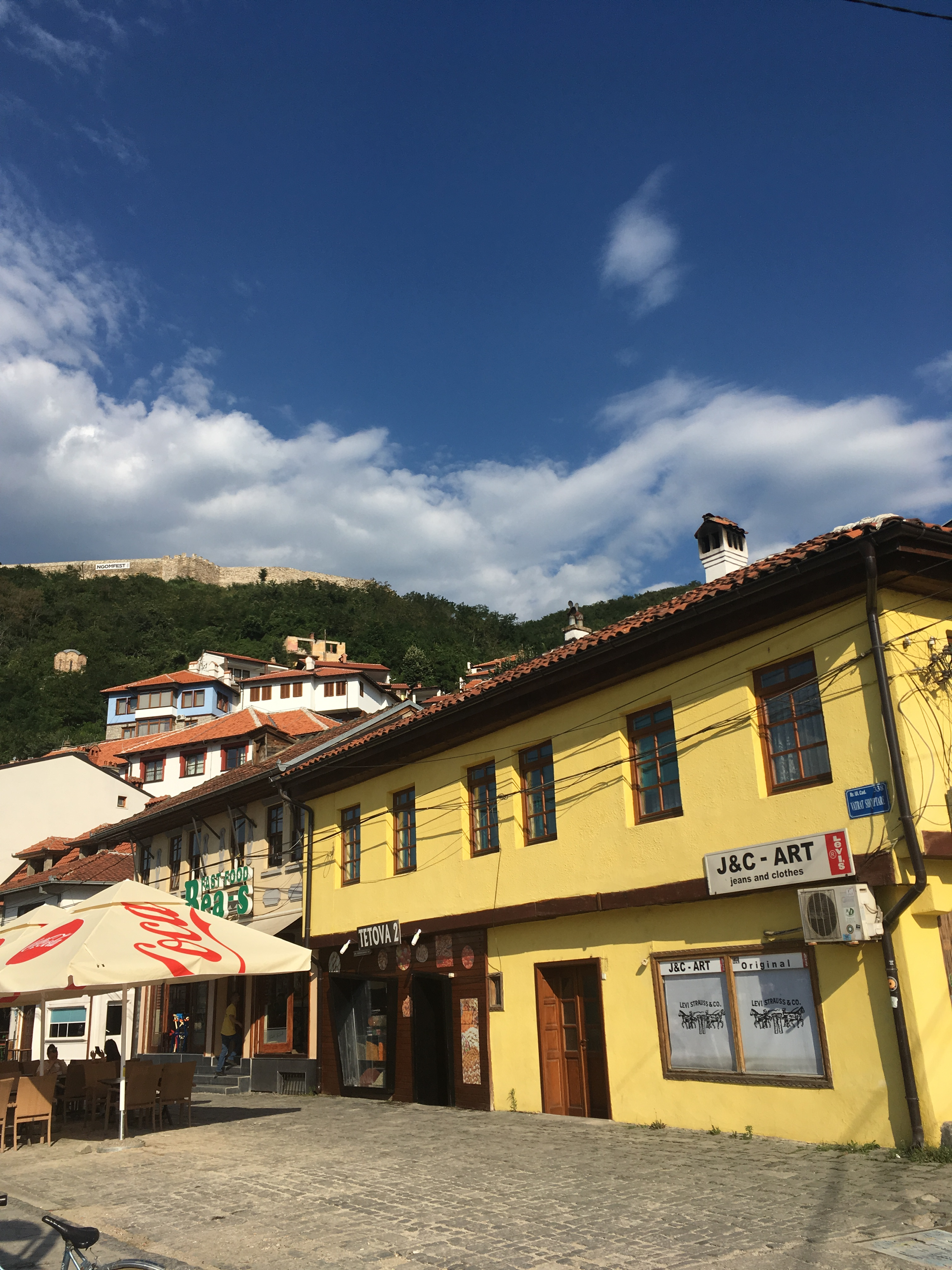 Стариот дел на Призрен